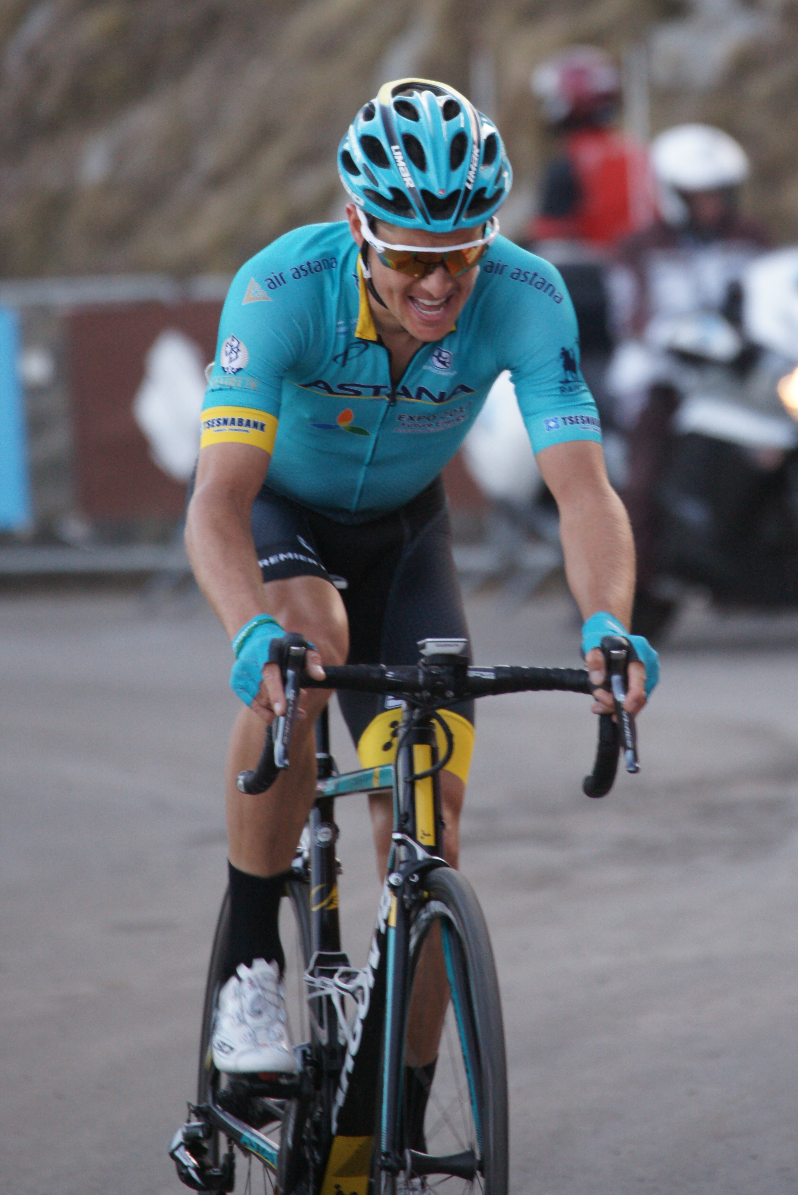 Jakob Fuglsang Roubion Paris-Nice 2017